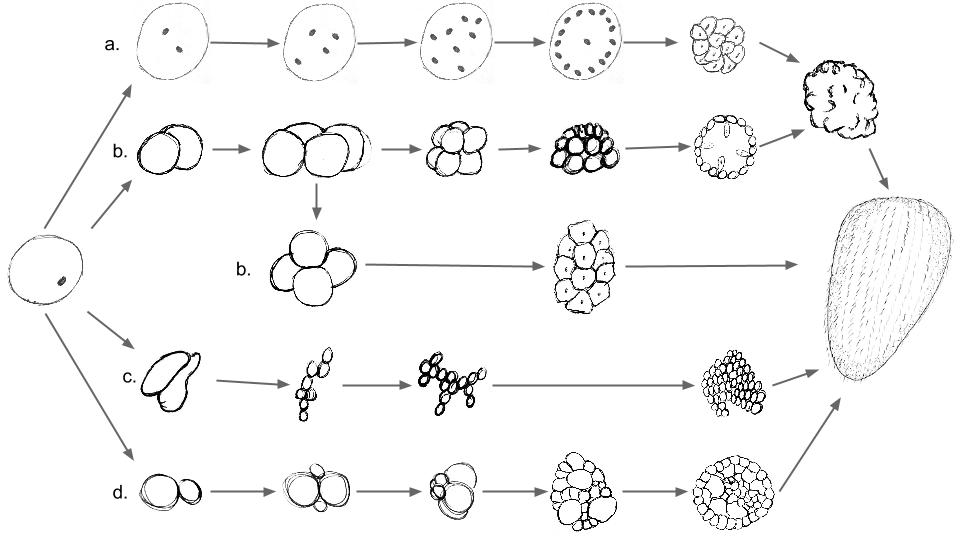 Padrões de clivagem possíveis em Obelia Loveni